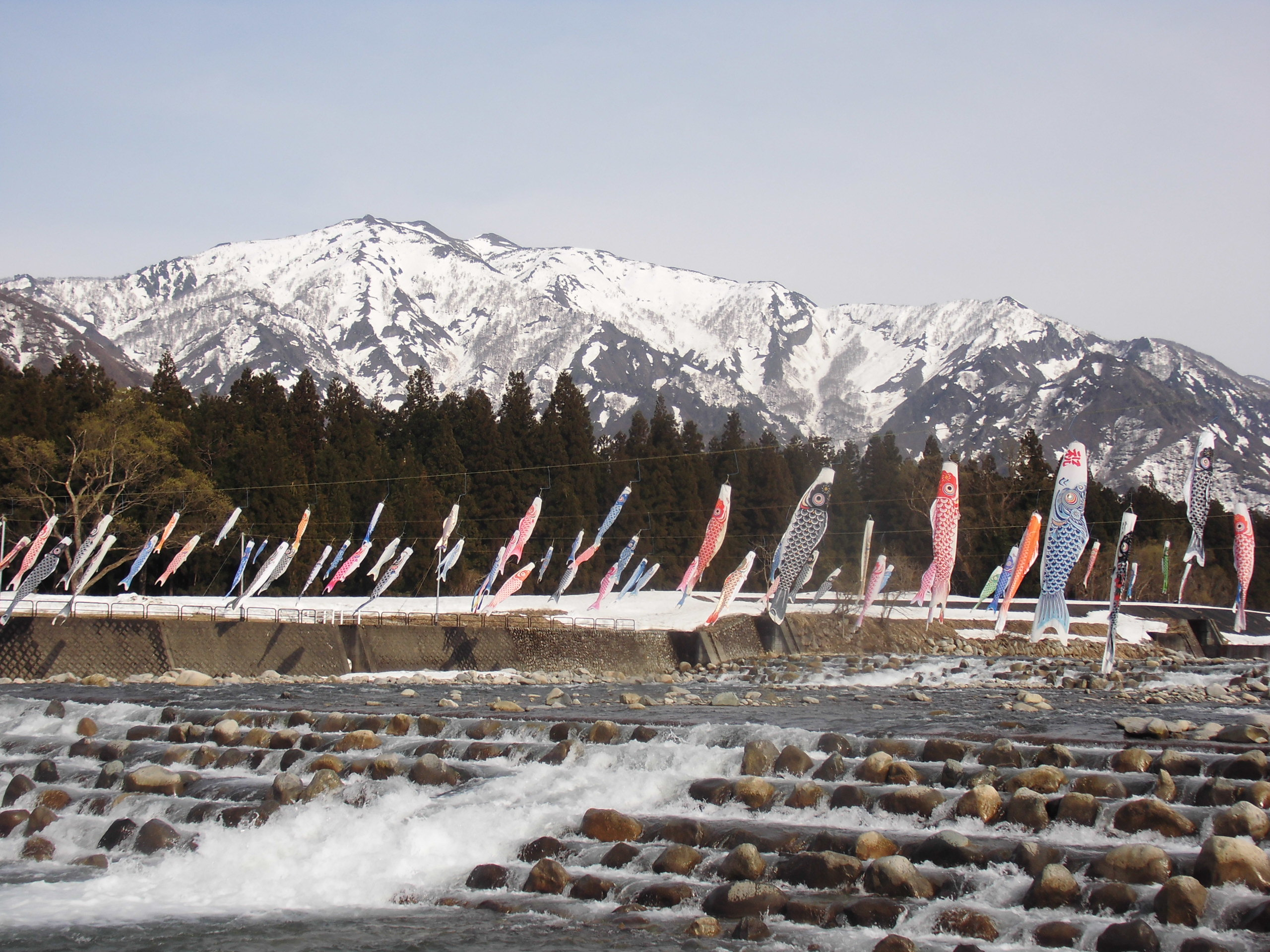 滝谷農村公園鯉のぼり・残雪の割引岳と雪解水の登川 （2015.04-12）